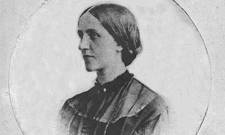 Photo de Dorothea Beale en 1858